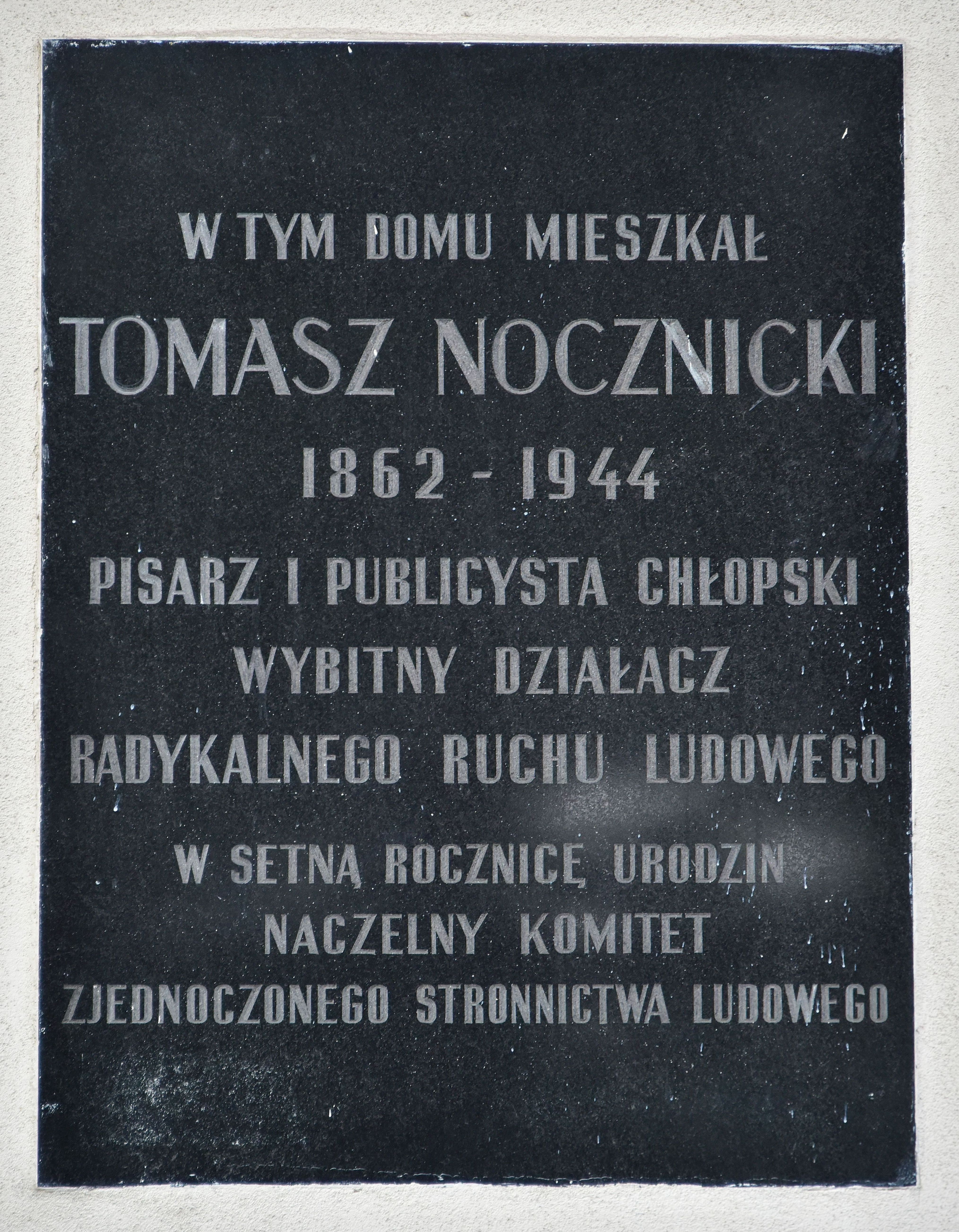 Tablica upamiętniająca Tomasza Nocznickiego na fasadzie budynku przy ul. Zygmunta Krasińskiego 10 w Warszawie